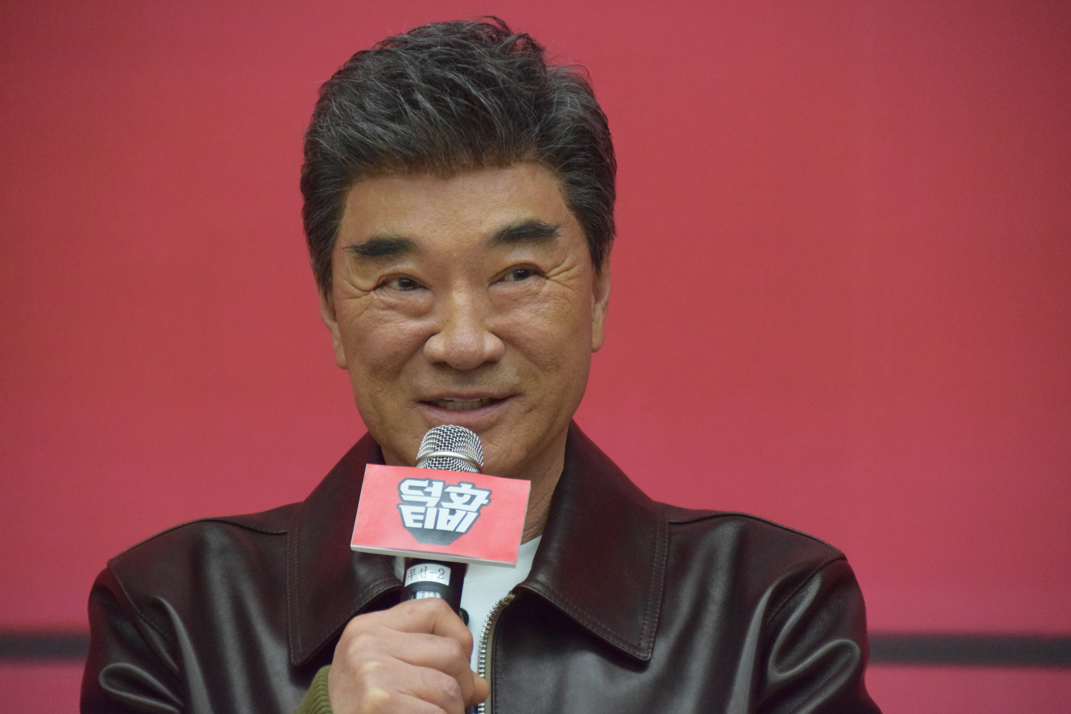 '1인미디어에 도전하는 중견 연예인' 이덕화의 활약상을 담은 KBS예능 '덕화티비' 제작발표회